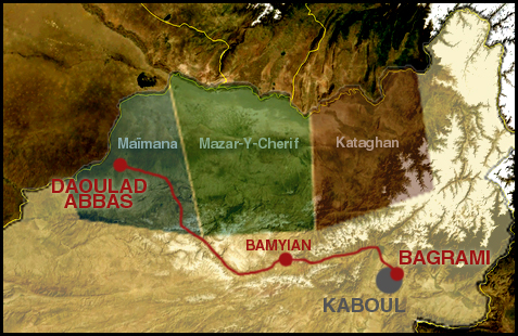 Trajet d'Ouroz dans Les Cavaliers de Kessel